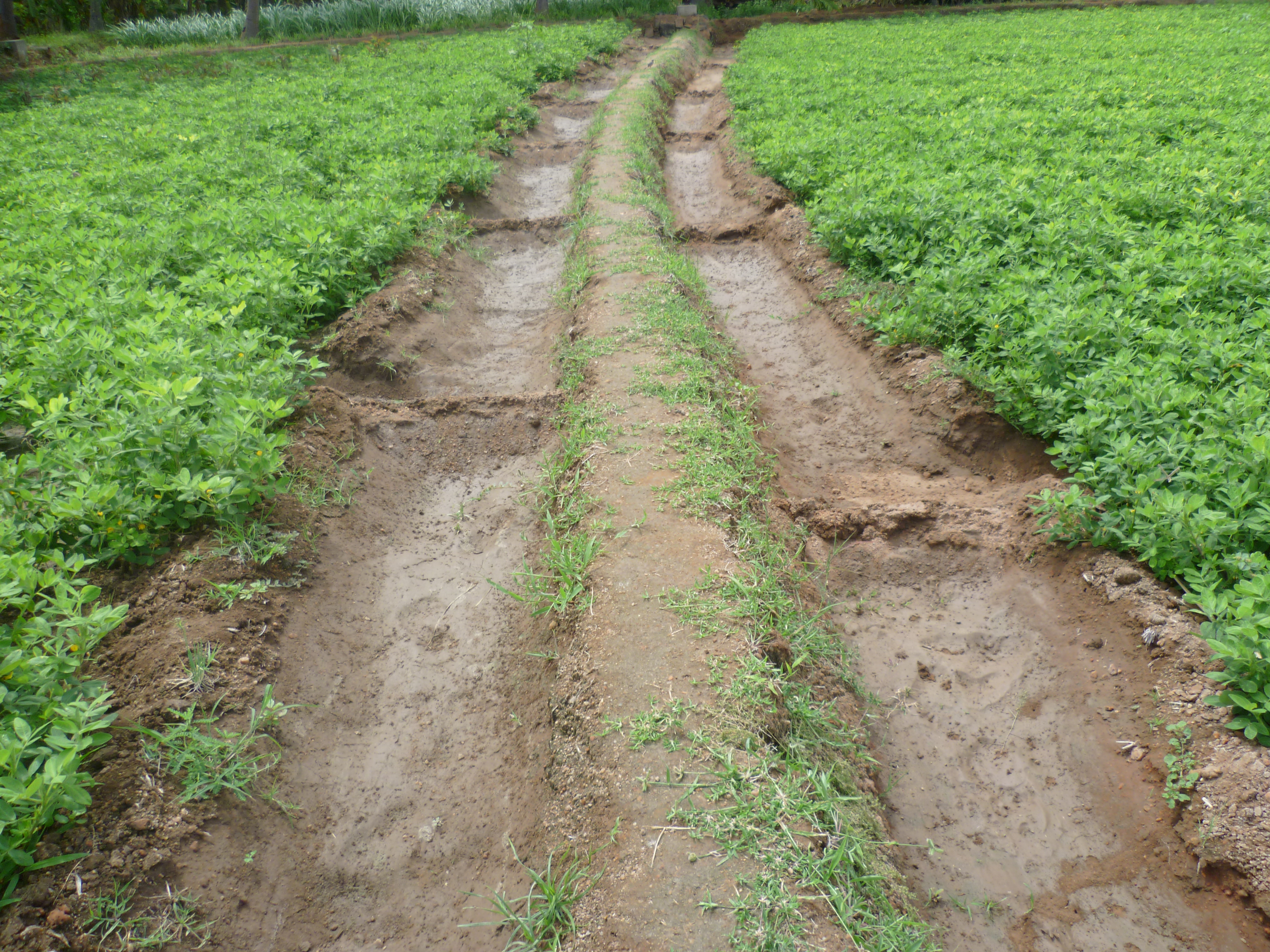 பசுமையை பறைசாற்றுகின்றன..